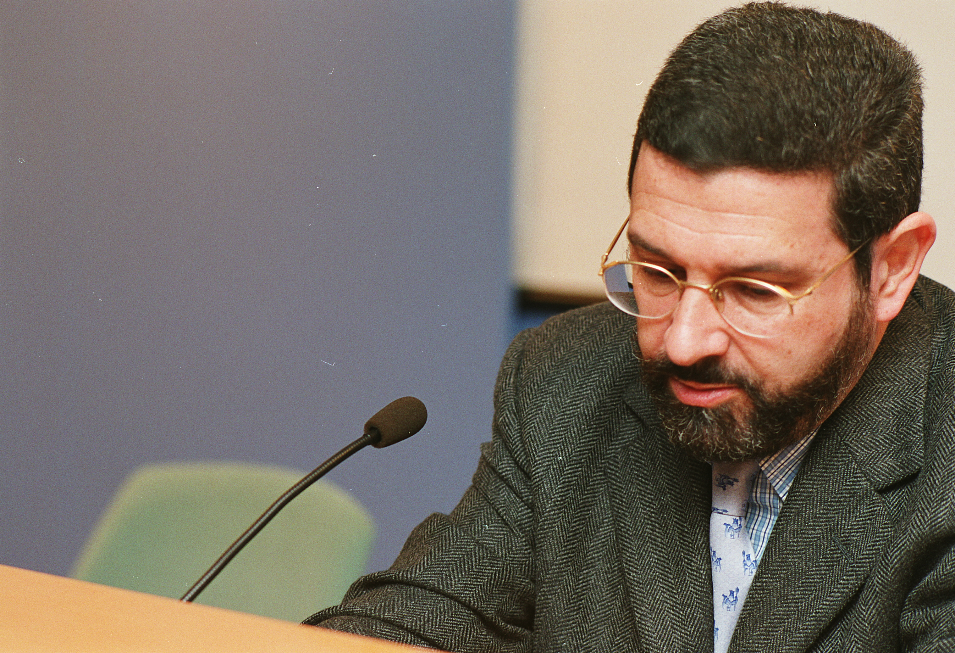 Joan Baptista Culla al MHC el 2001.